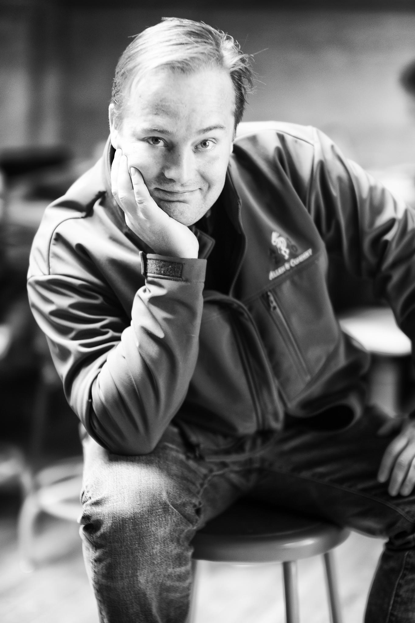 Jason Calacanis